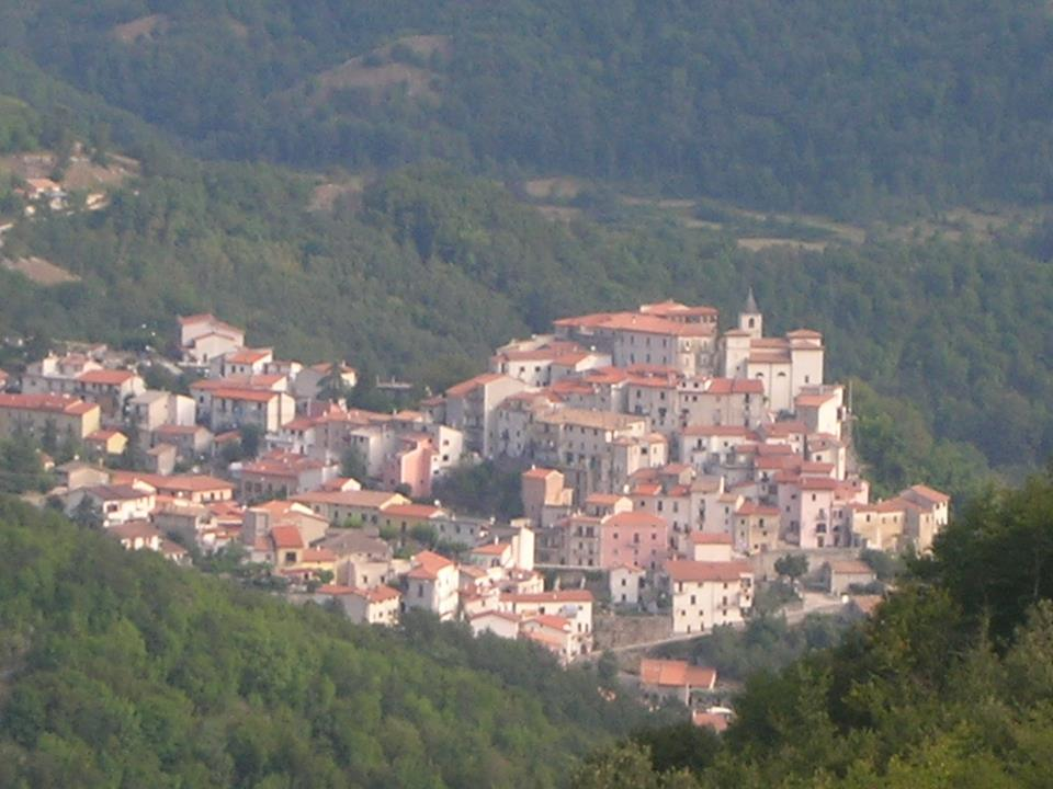 Estate di Acquafondata